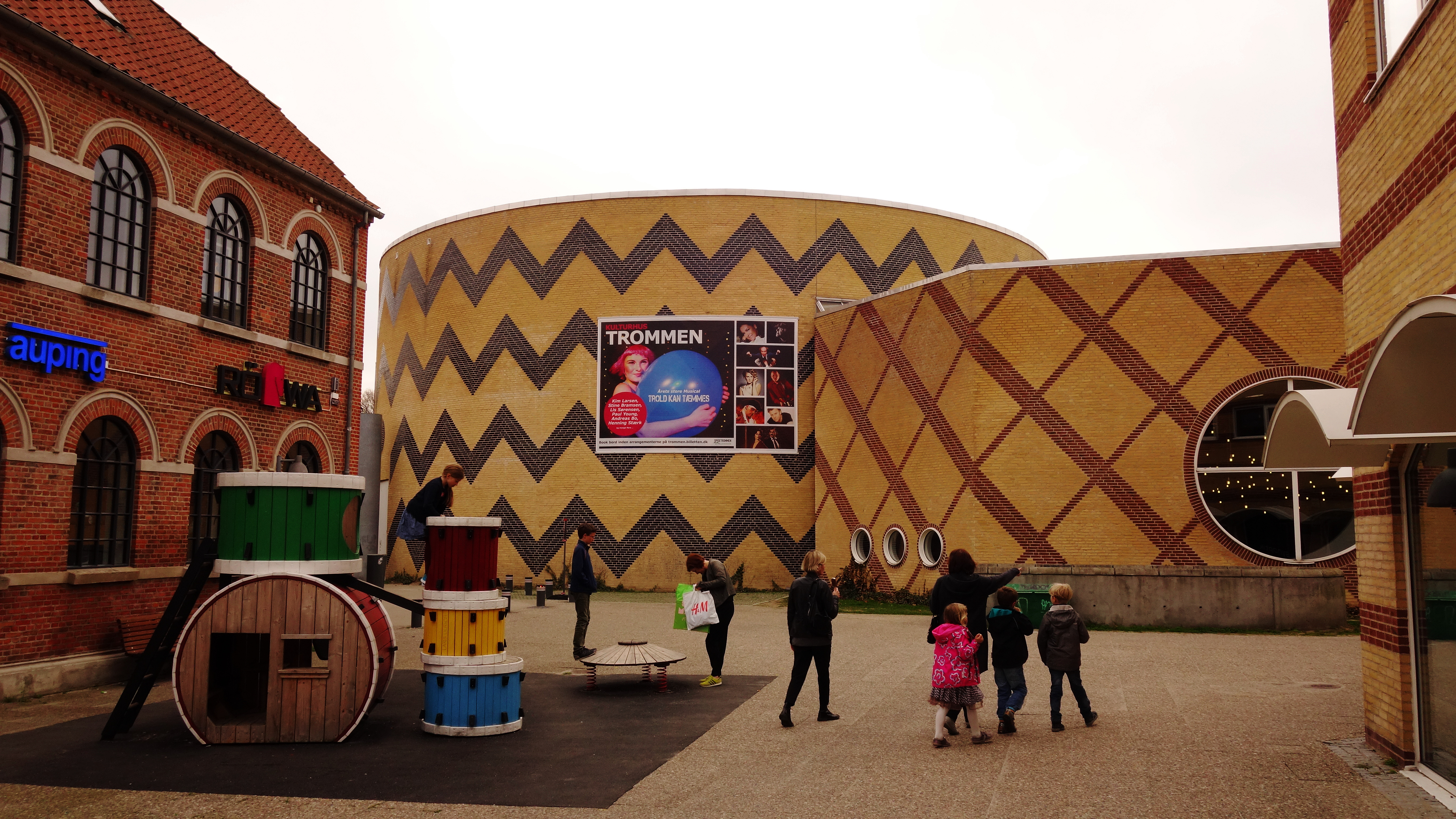 Kulturhus Trommen, Hørsholm - Knud Munk 1987